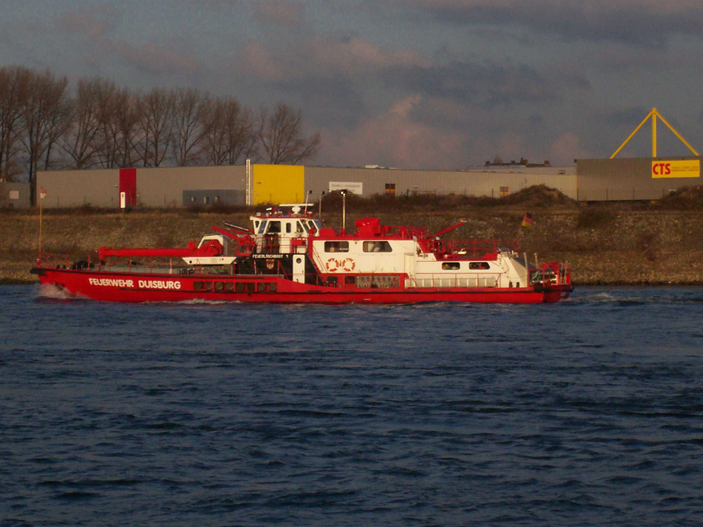 Feuerlöschboot „Duisburg 1“ auf dem Rhein in Höhe Duisburg-Hochemmerich